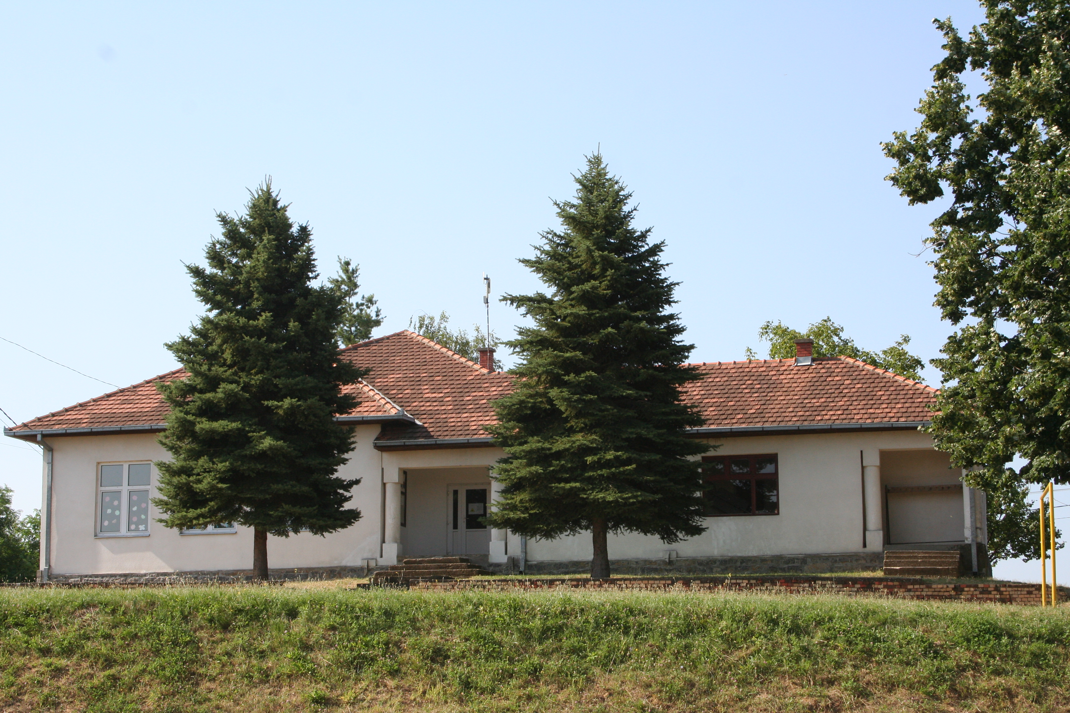 Seoska škola, Ćukovine